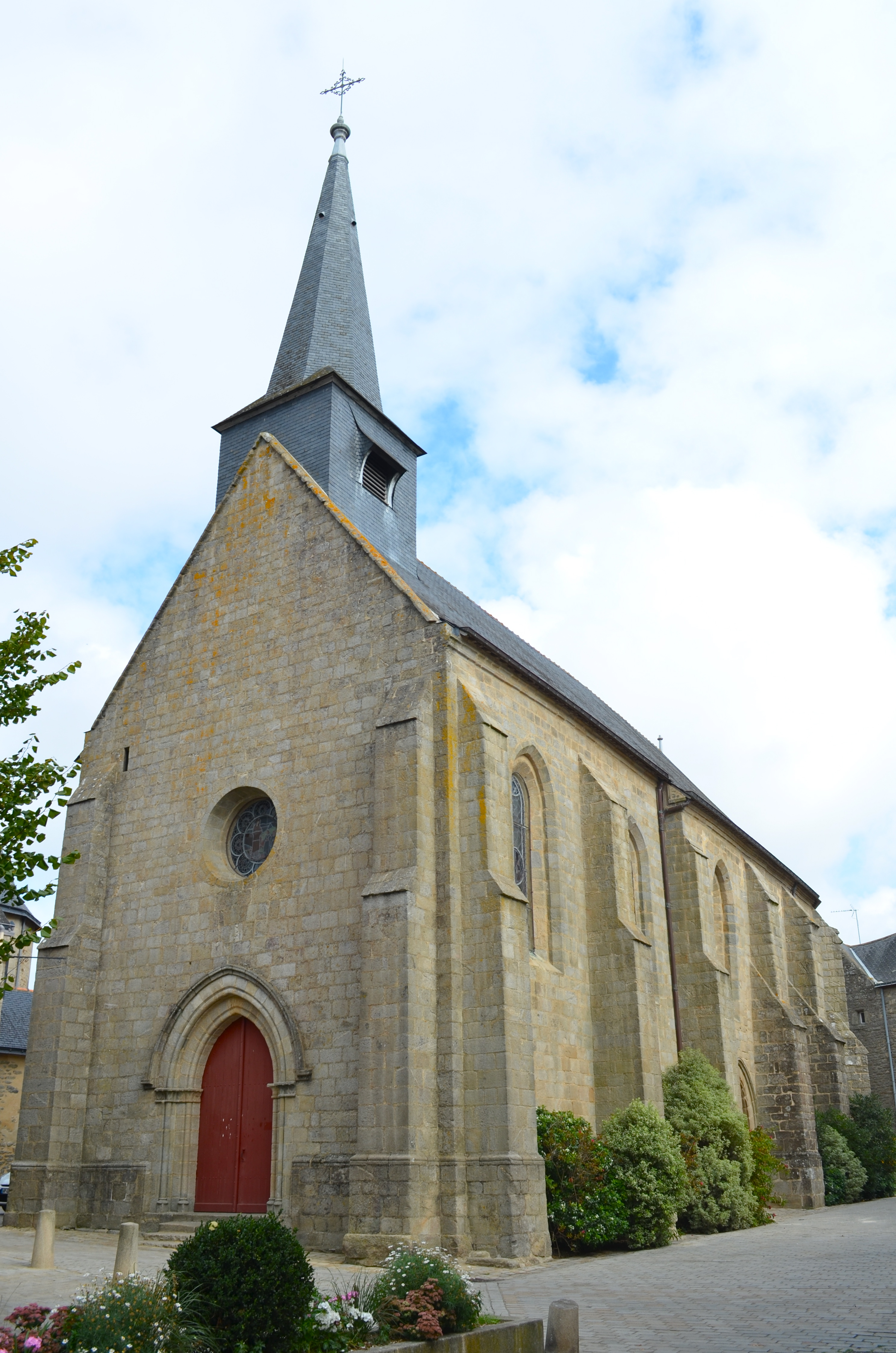 Chapelle Notre-Dame-la-Blanche - Guérande (Loire-Atlantique)